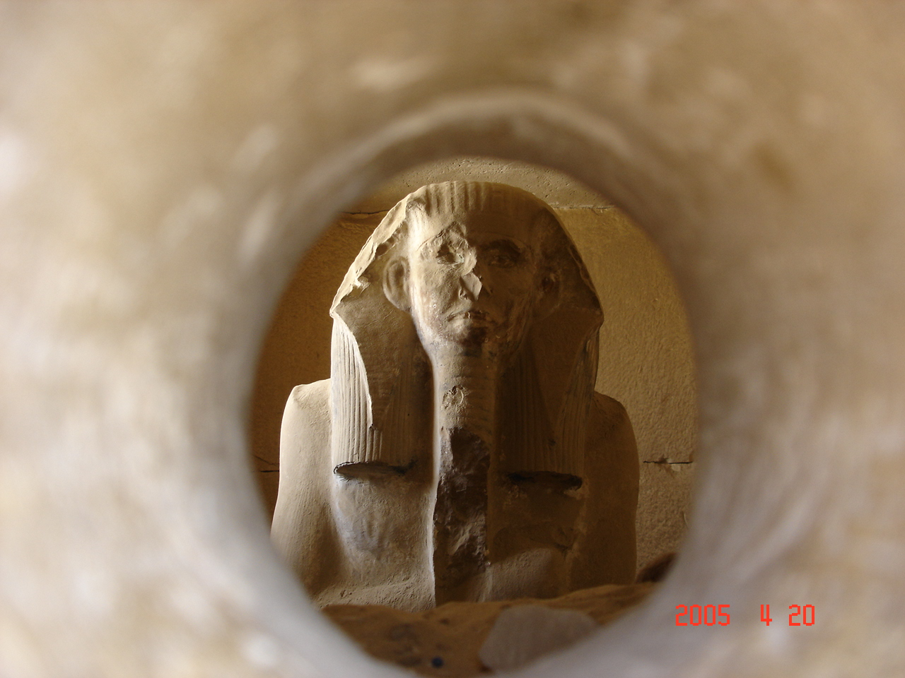 Dzsószer szobra eredeti helyén, a szerdabfülkében (Szakkara, Egyiptom)